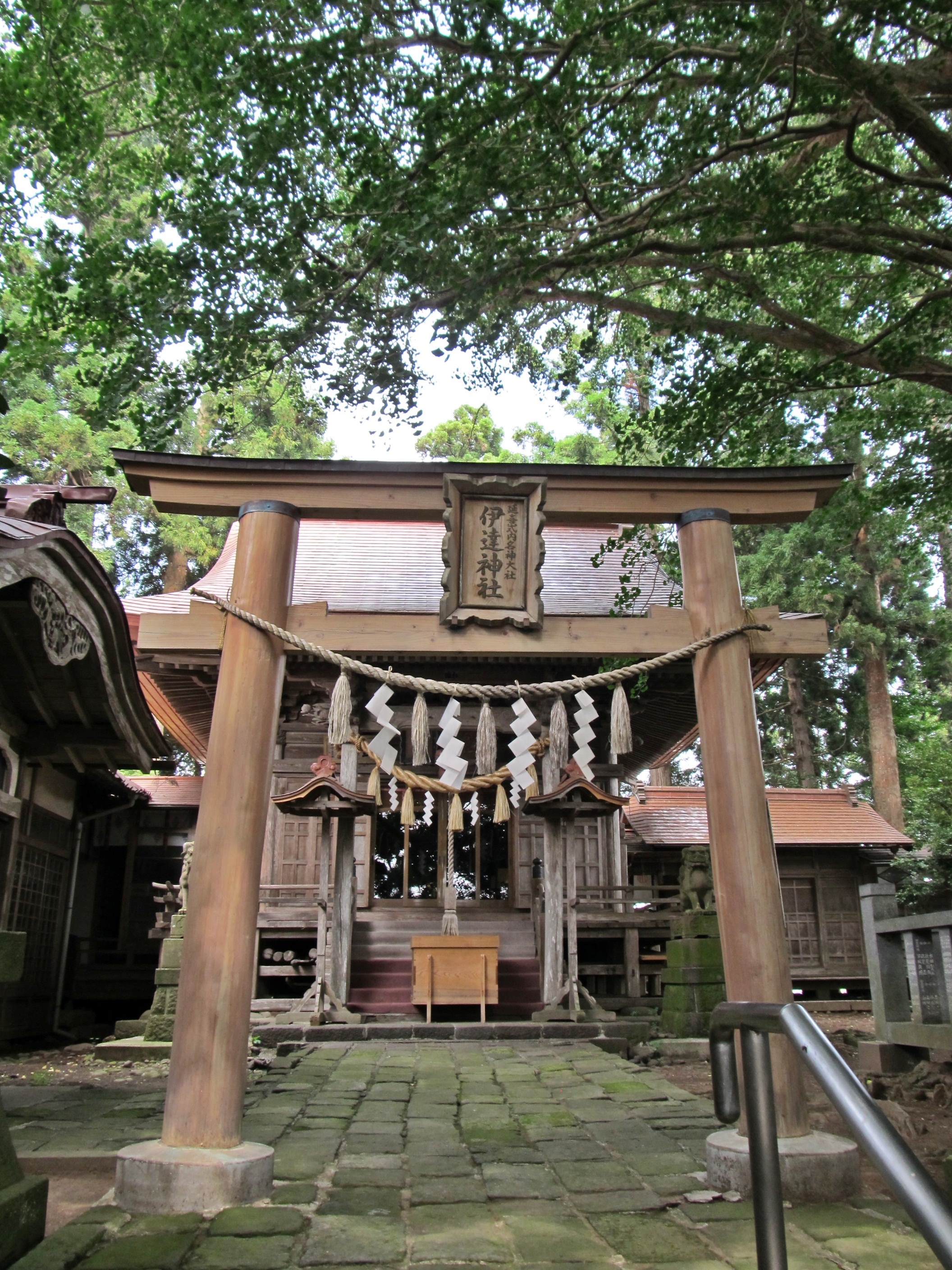 伊達神社第二鳥居